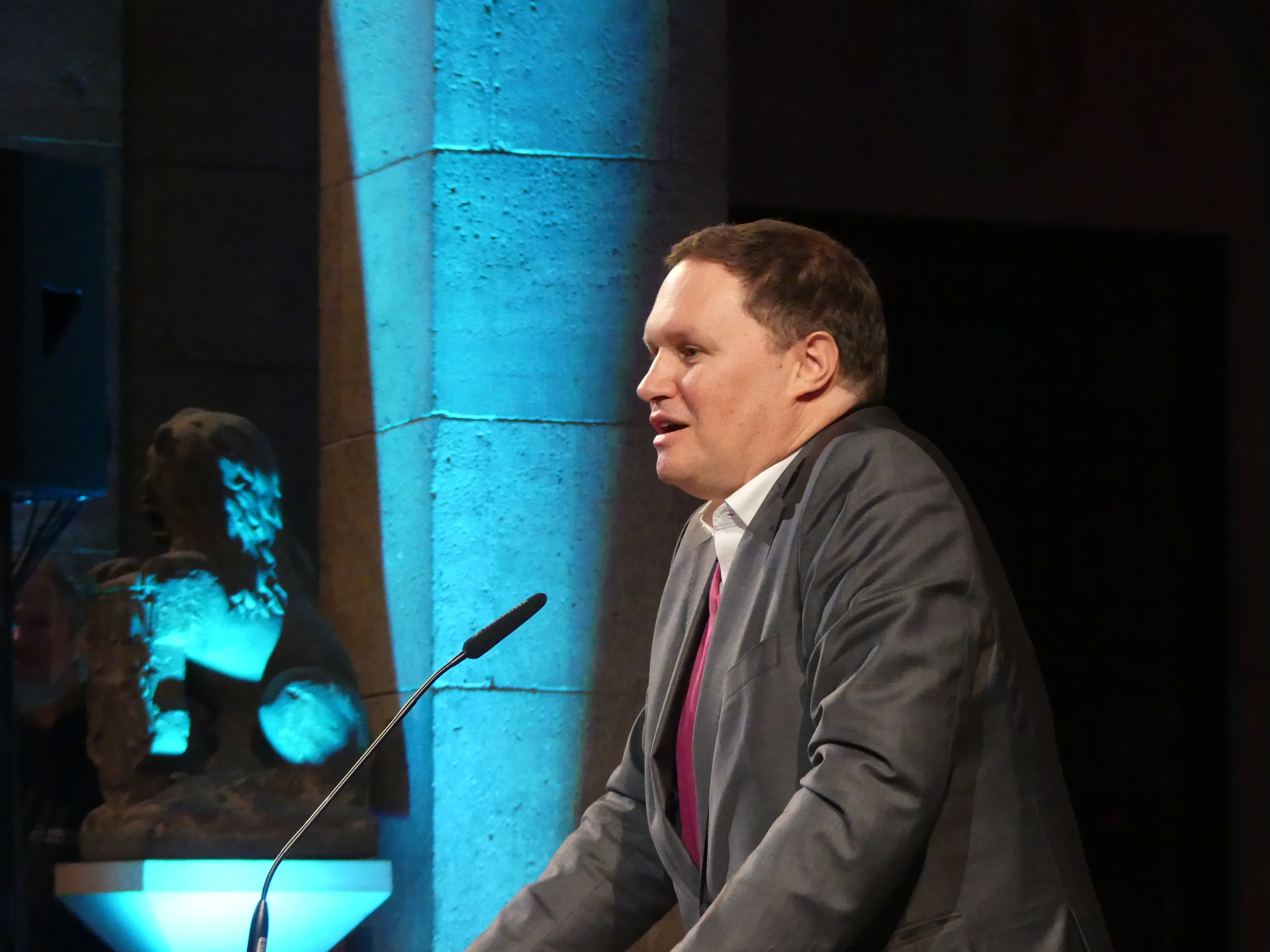 Carsten Brosda, Hamburger Senator für Kultur und Medien, Eröffnung der Ausstellung „Christian Warlich auf St. Pauli“ am 26.11.2019 im Museum für Hamburgische Geschichte